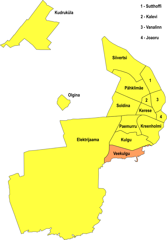 Narva linnaosa Veekulgu